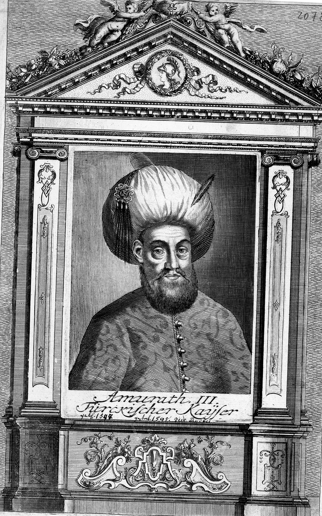 III. Murád (Manisa, 1546. július 4. – Isztambul, 1595. január 16.) az Oszmán Birodalom szultánja volt 1574-től haláláig.